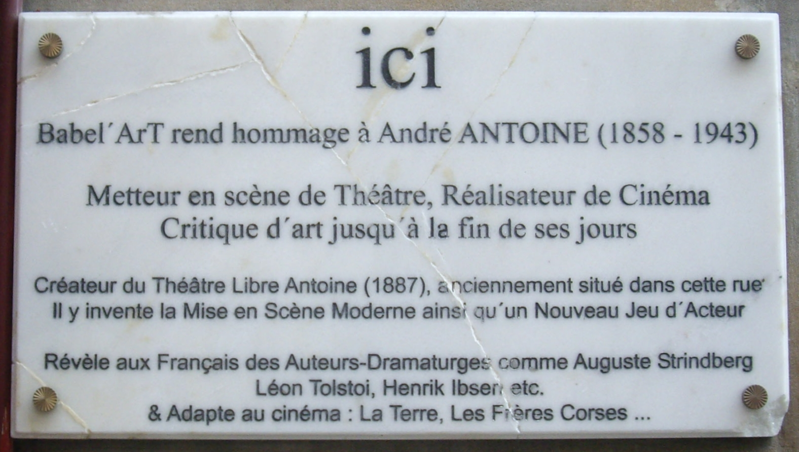 Plaque commémorative, 10 rue André-Antoine, Paris 18e. « Ici Babel'ArT rend hommage à André Antoine (1858-1943), metteur en scène de théâtre, réalisateur de cinéma, critique d'art jusqu'à la fin de ses jours. Créateur du Théätre Libre Antoine (1887), il y invente la mise en scène moderne ainsi qu'un nouveau jeu d'acteur, révèle aux Français des auteurs dramatiques comme Auguste Strindberg, Léon Tolstoï, Henrik Ibsen, etc. et adapte au cinéma La Terre, Les Frères corses... »